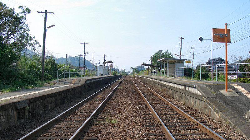 JR三角線住吉駅 ホーム 手前が熊本駅方面 撮影者/著者/著作権保有者 : MK Products (本人がアップロード) 撮影日 : 2006/10/04 住吉駅_用にアップロードした画像です。良い画像があれば別の画像に変えてください。